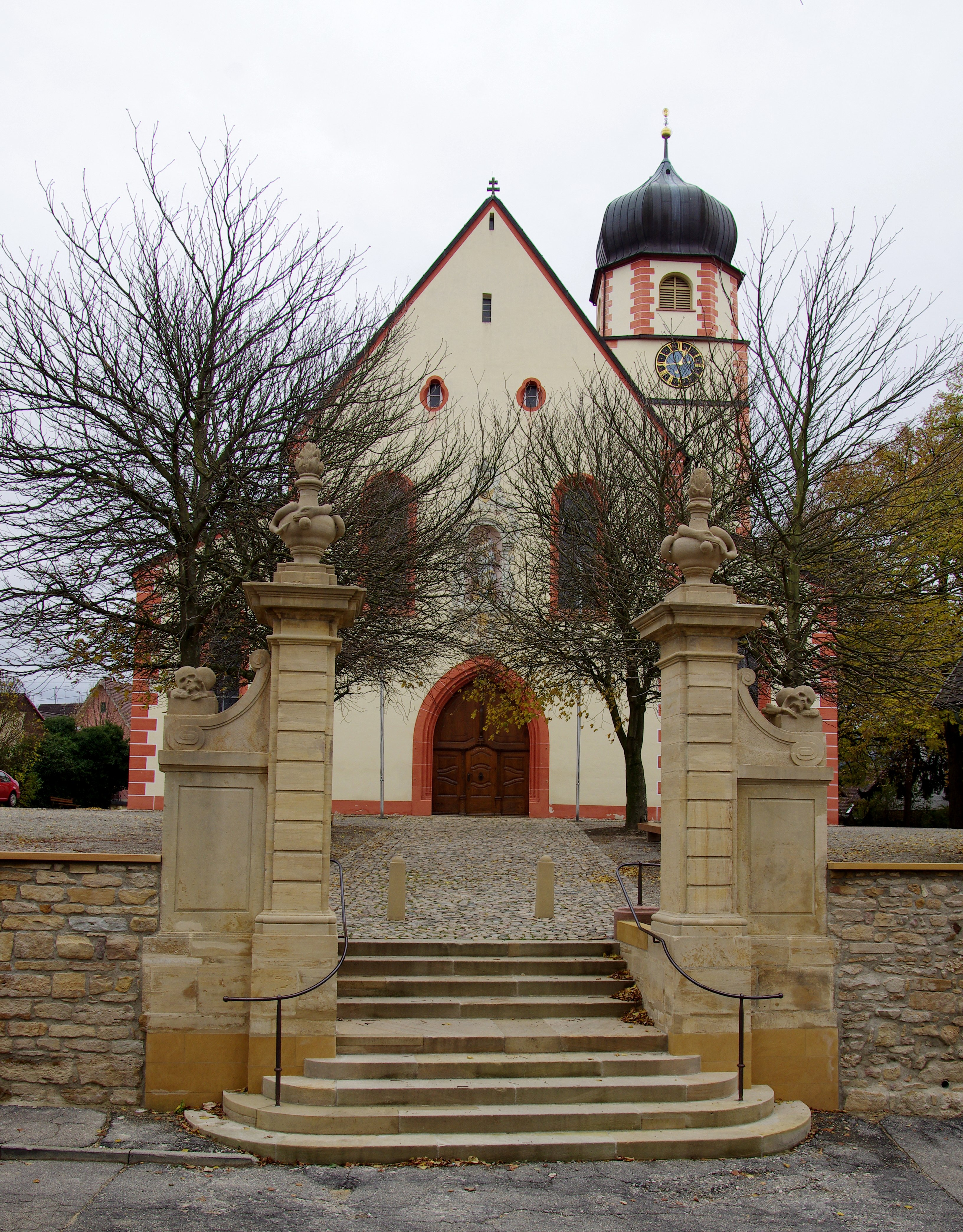 Bilder des Innenraums der Kirche St. Mariä Himmelfahrt in Kirchhofen, einem Teil der Gemeinde von Ehrenkirchen.